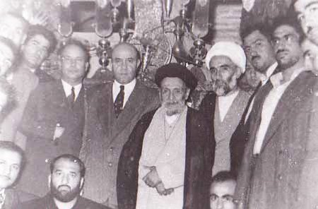 كاشاني و شعبان جعفري در يك عكس يادگاري